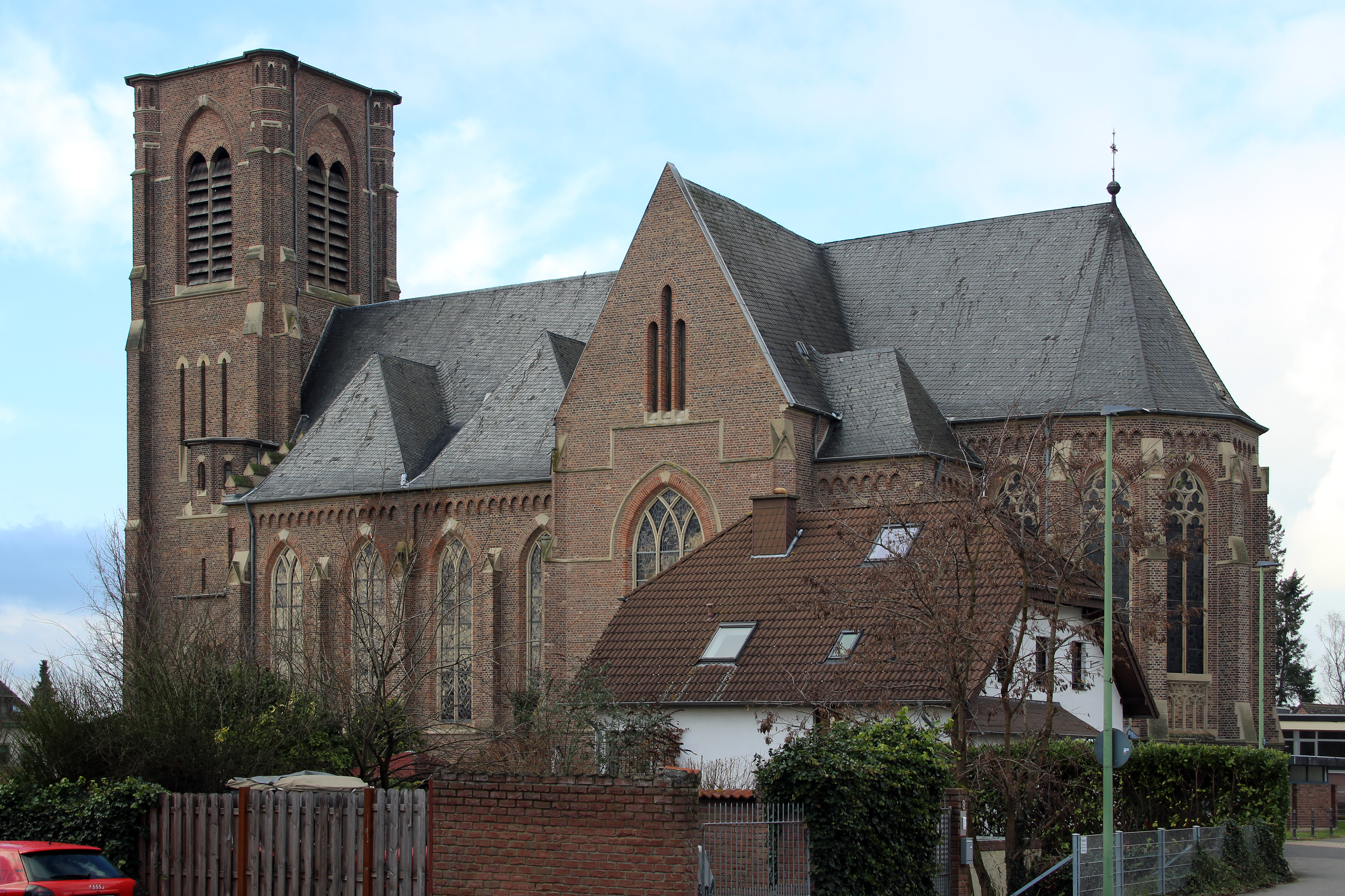 Kath. Pfarrkirche St. Laurentius in Merzenich - Südost-Ansicht.